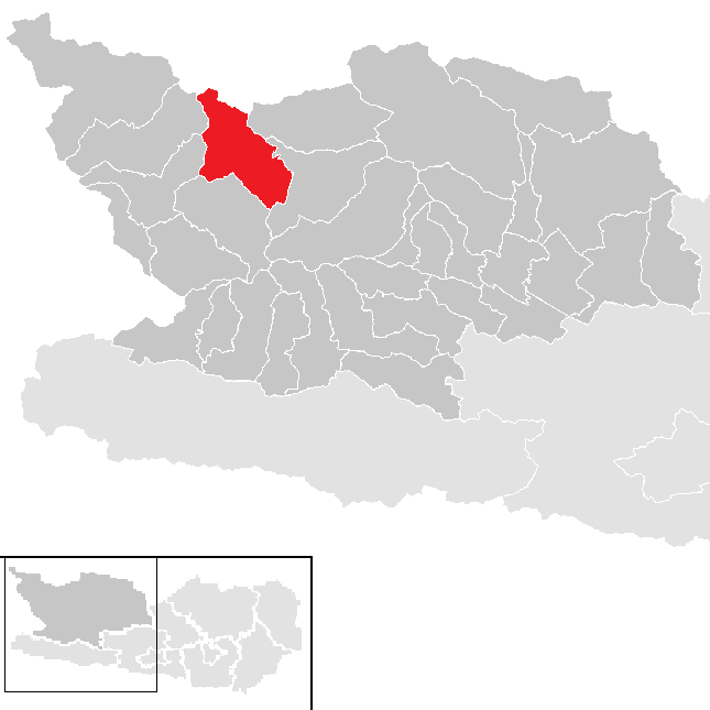 Bezirk Spittal an der Drau